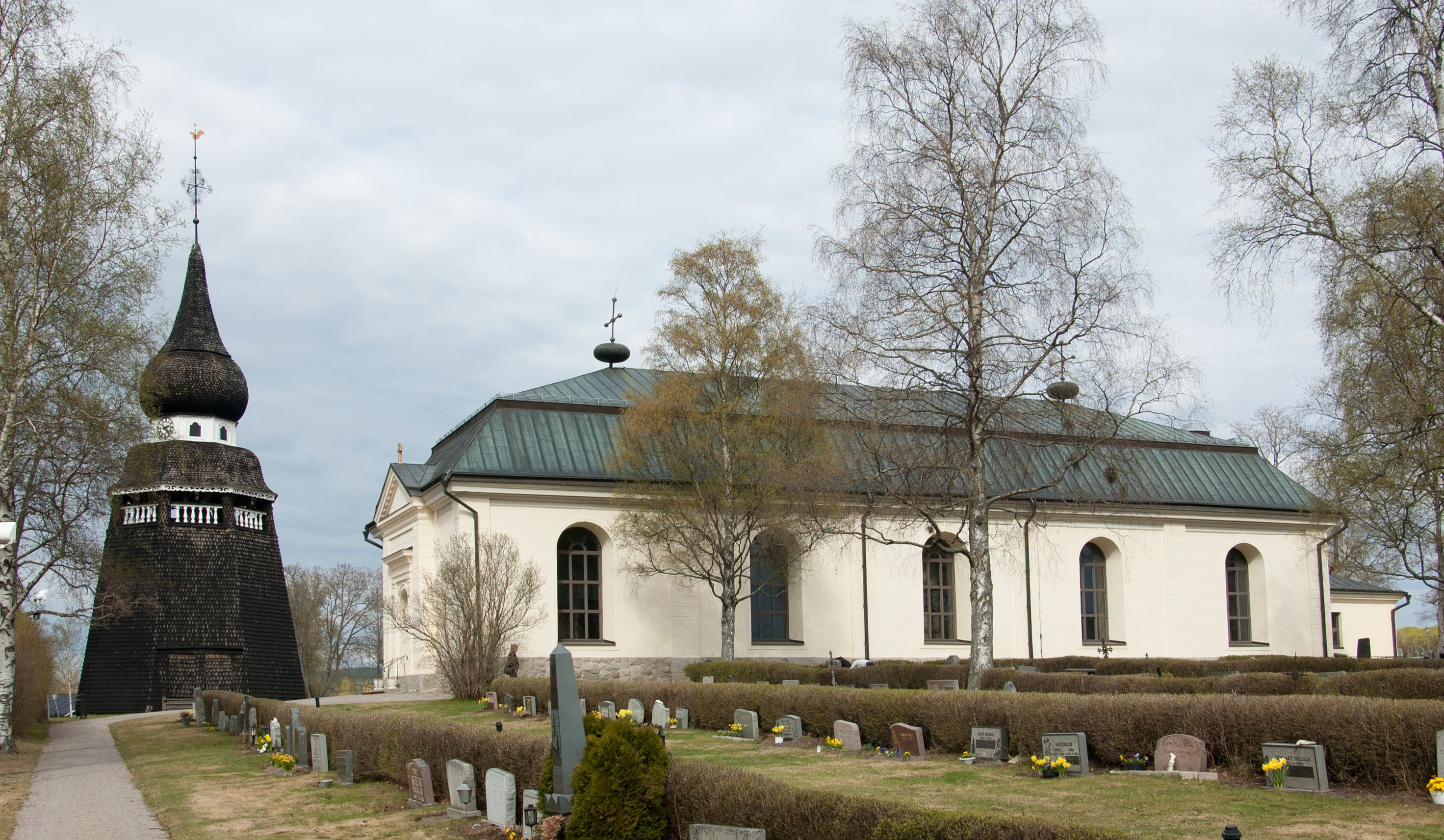 Ovanåkers kyrka